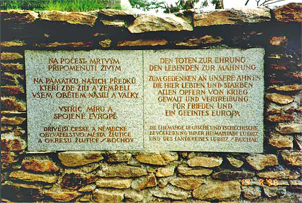 Gedenktafel in Žlutice, Žlutice 1996-09-14